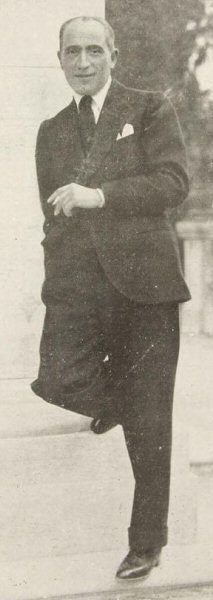 photo from Italian magazine Kinema, 1930.